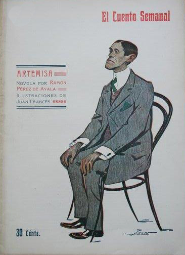 Portada de Artemisa.